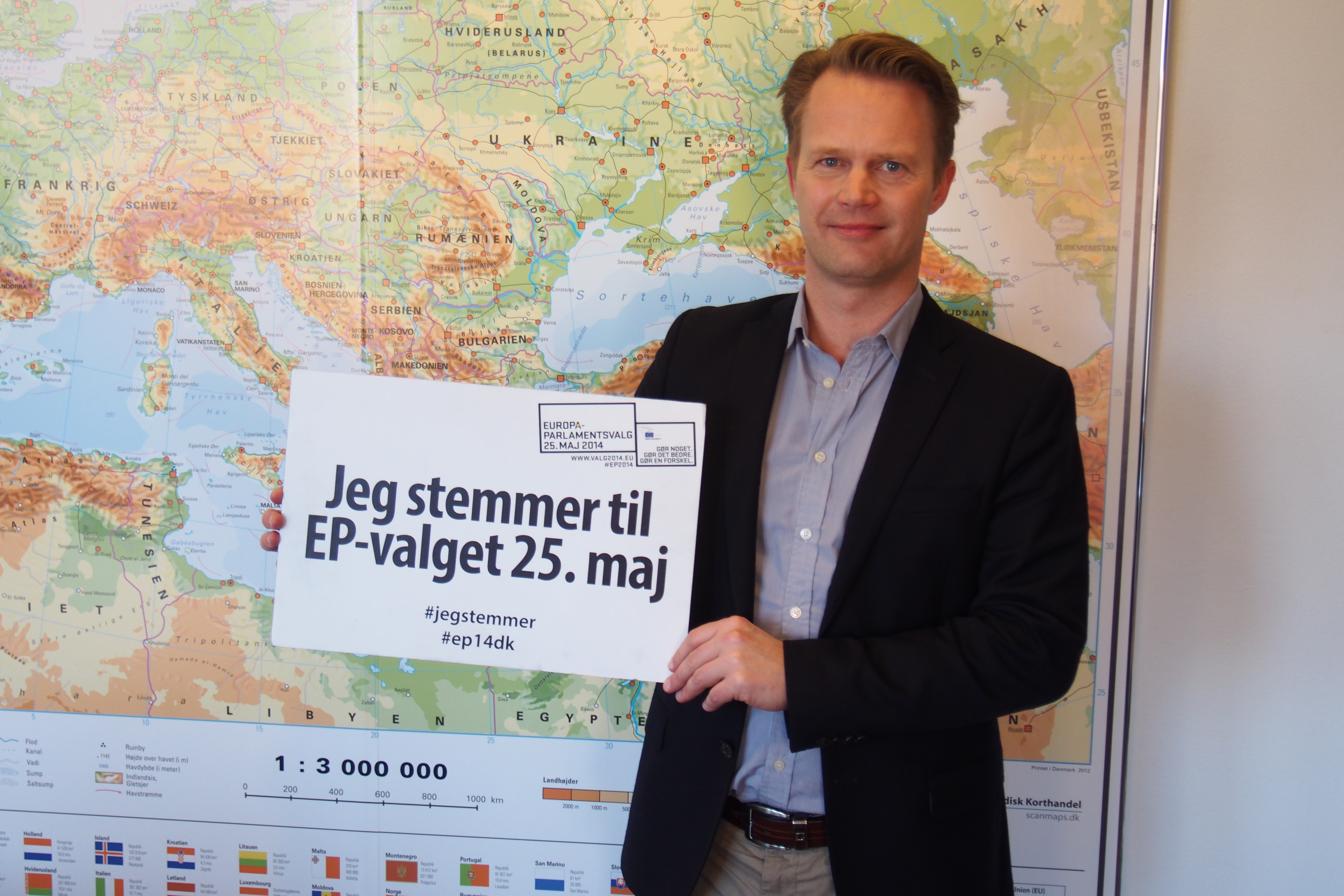 Jeppe Kofod, spidskandidat for Socialdemokraterne.